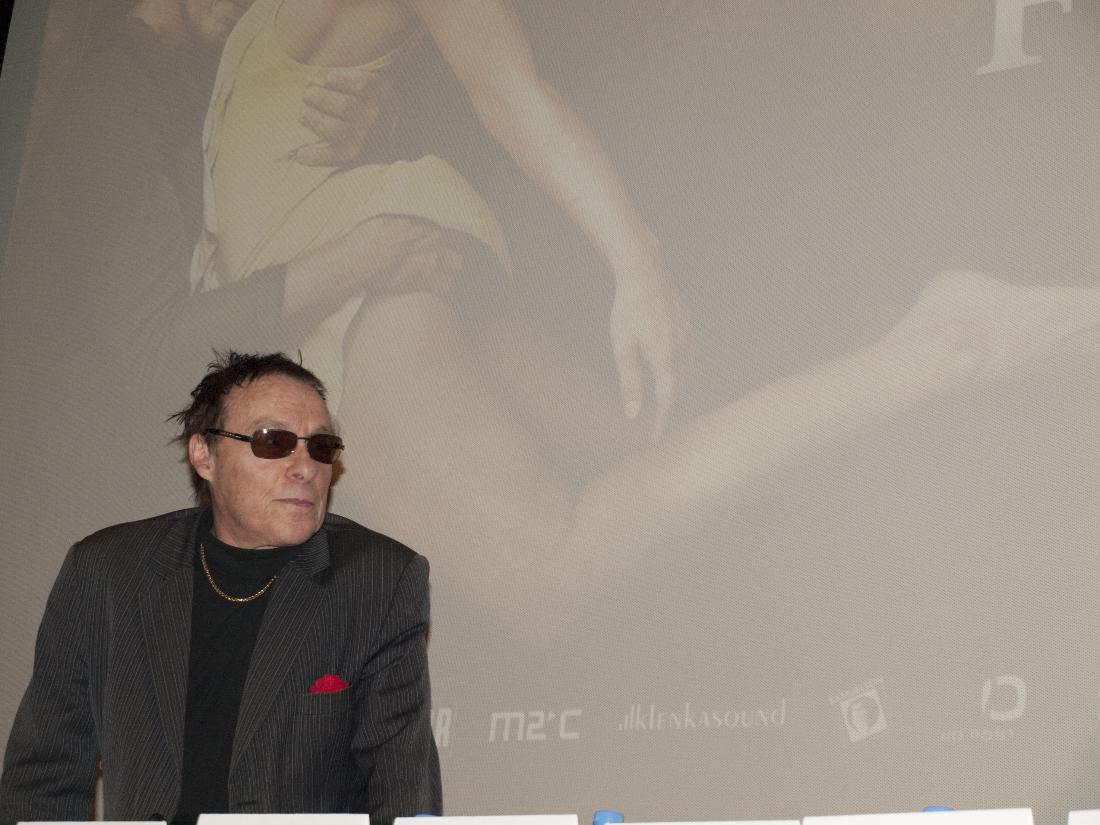 Tisková konference filmu Fotograf z 6.1.2015 - Autor Karolína Černá pro & 10Mpix.cz